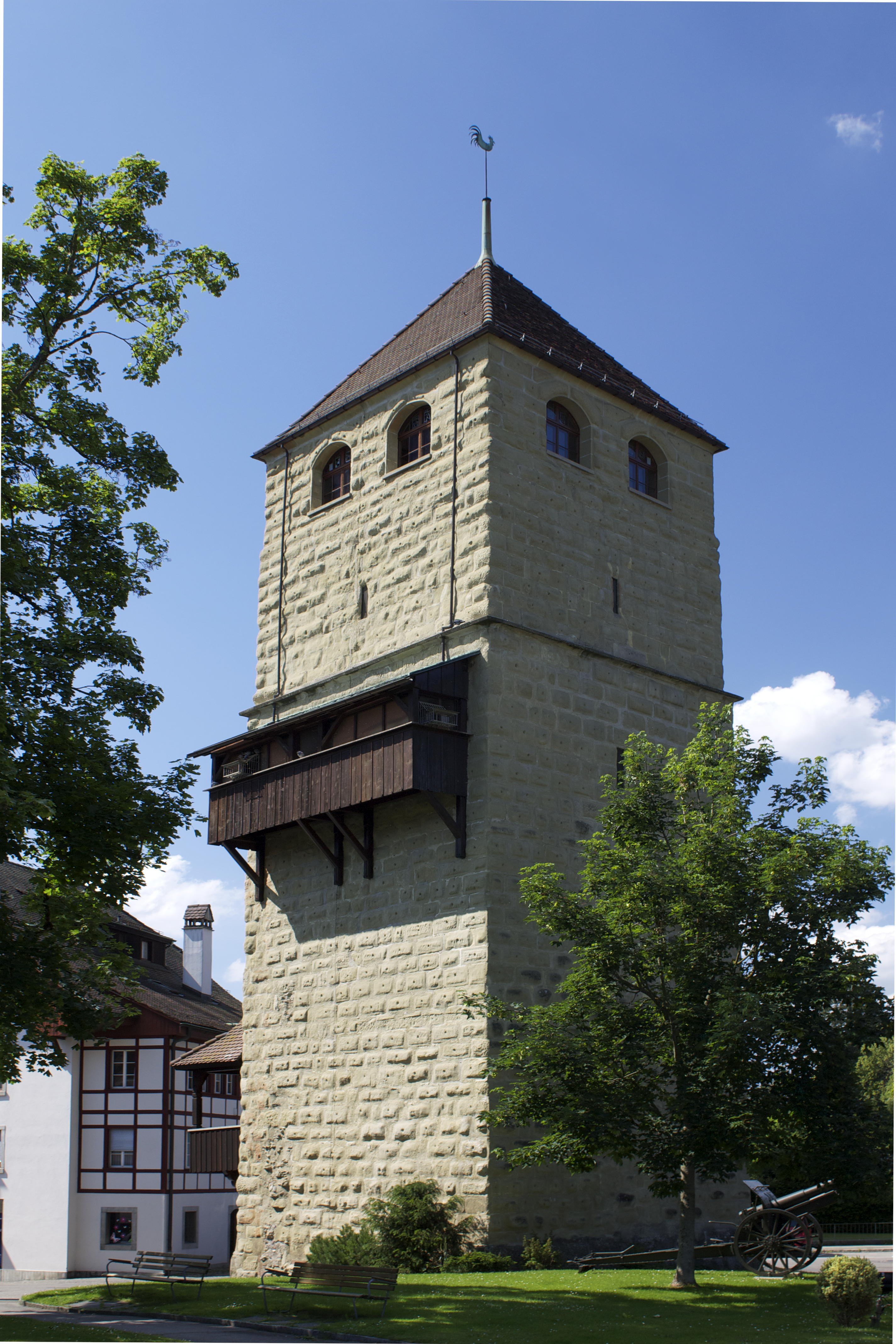 Der Pulverturm in Zofingen, in Richtung Altstadt aufgenommen